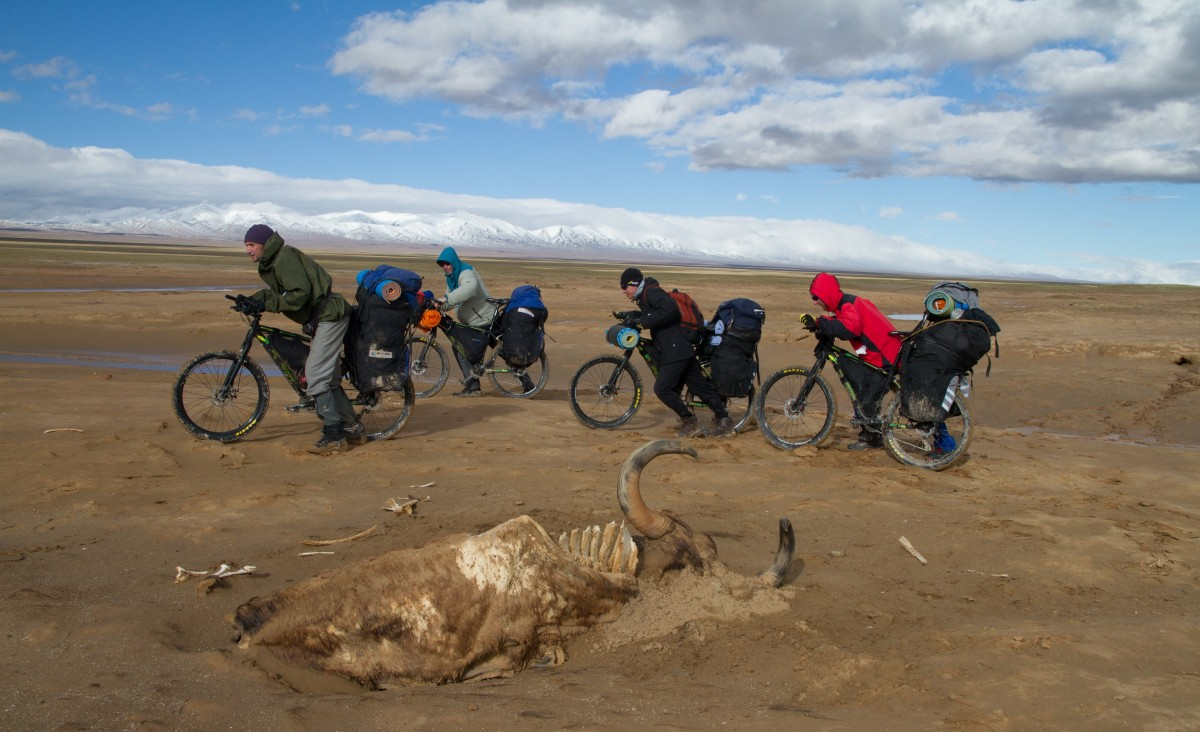 Андрей Королёв. Путешествие по Тибету, 2014 год.